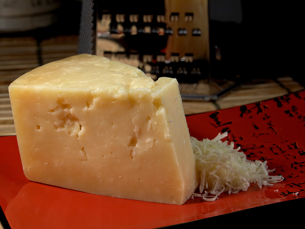 Stravecchio Parmesan Cheese